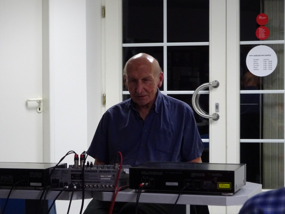 Černý Jiří hudební kritik.